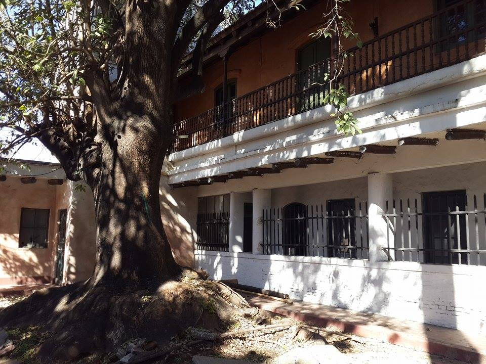 chacra de los tapiales patio interno